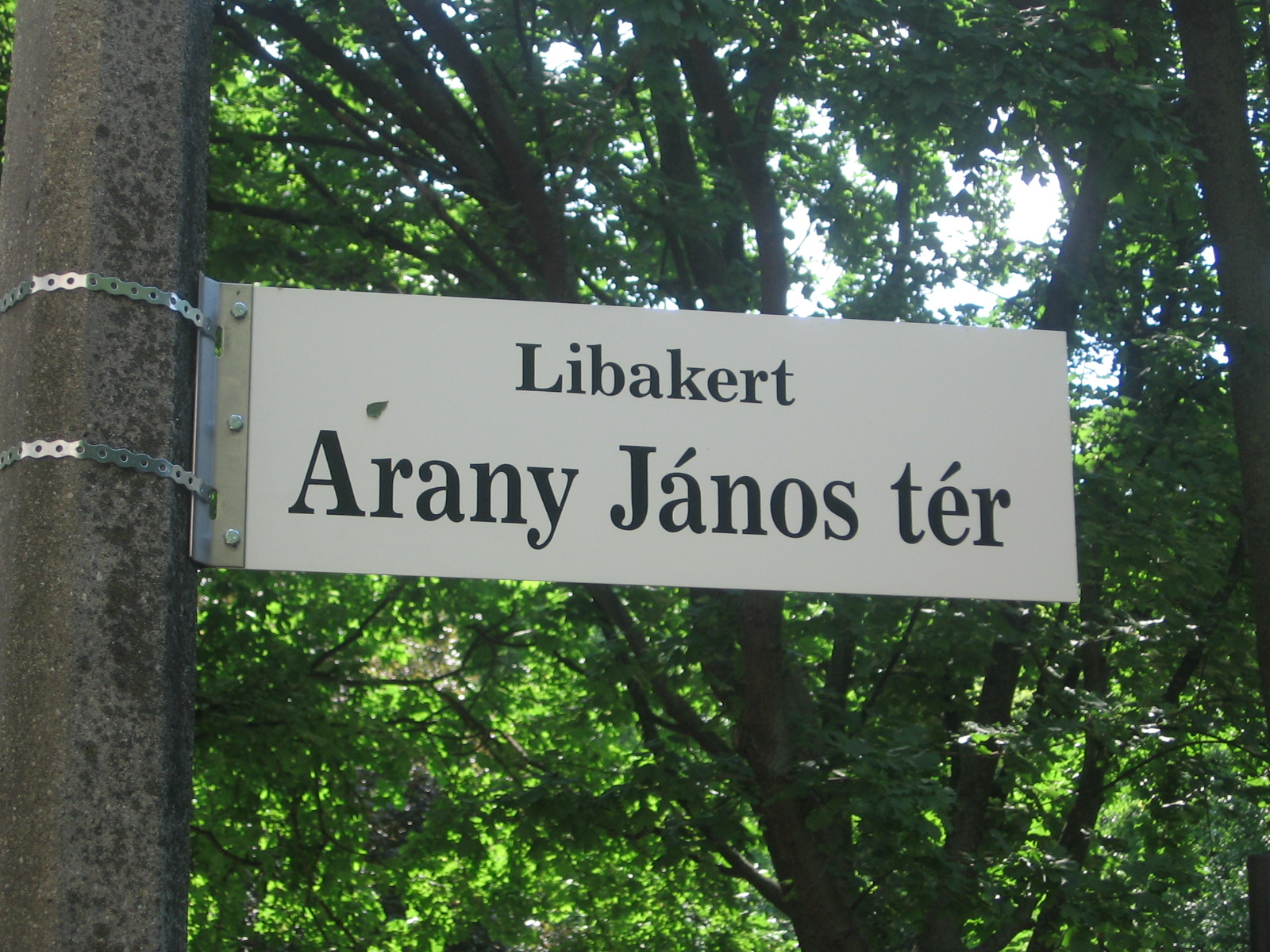 Debreceni Arany János tér táblája